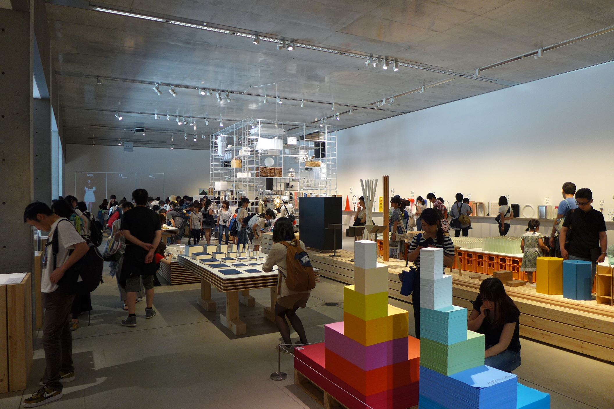 21 21 DESIGN SIGHT Interior